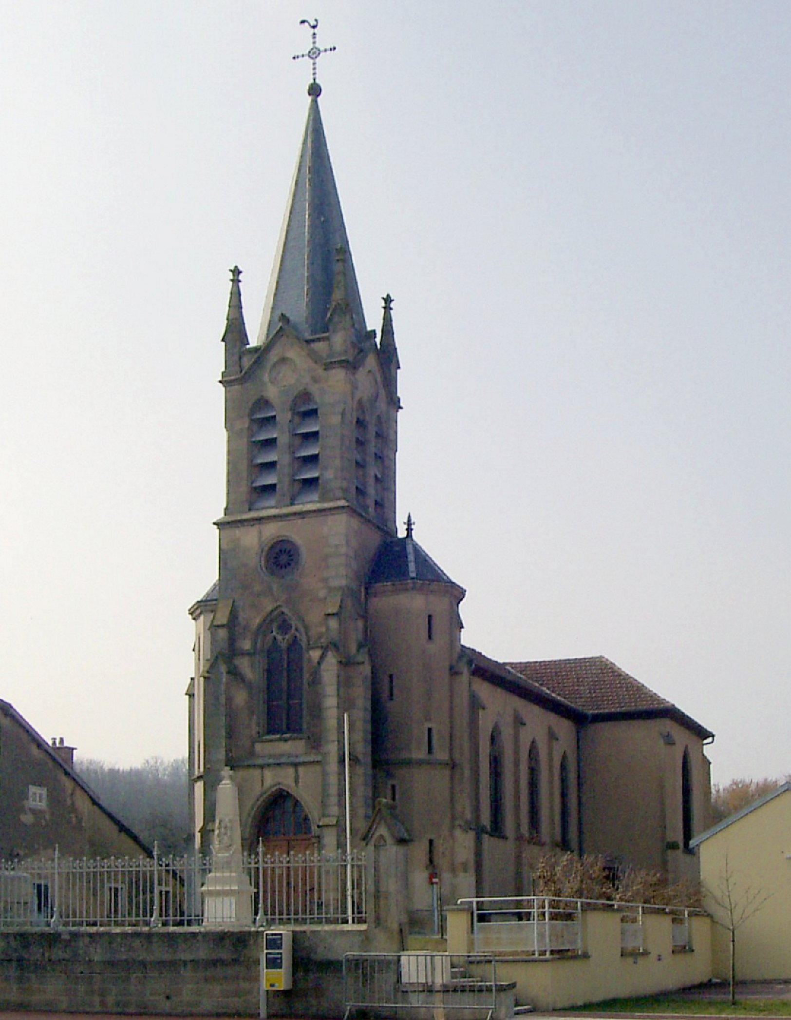 L'église Saint-Jean-Baptiste d'Hymont, côté est